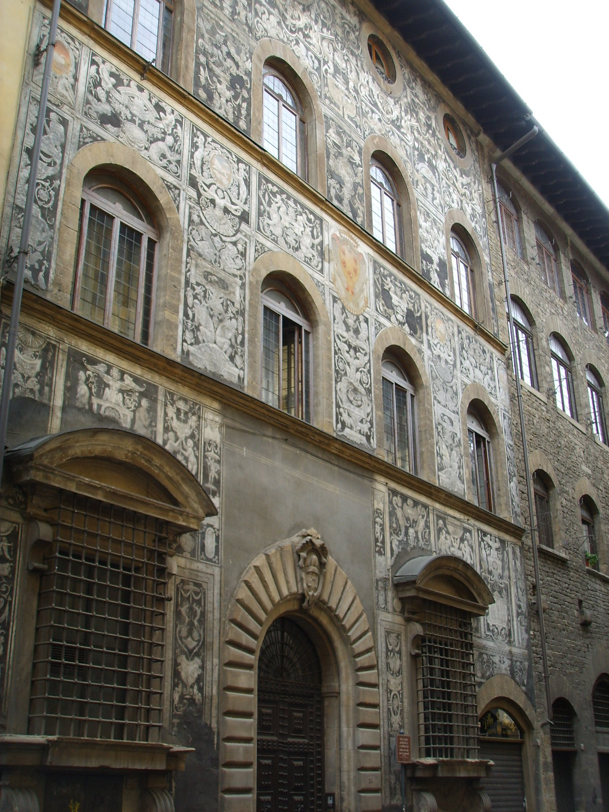 Palazzo di Bianca Cappello, Florence, Italy